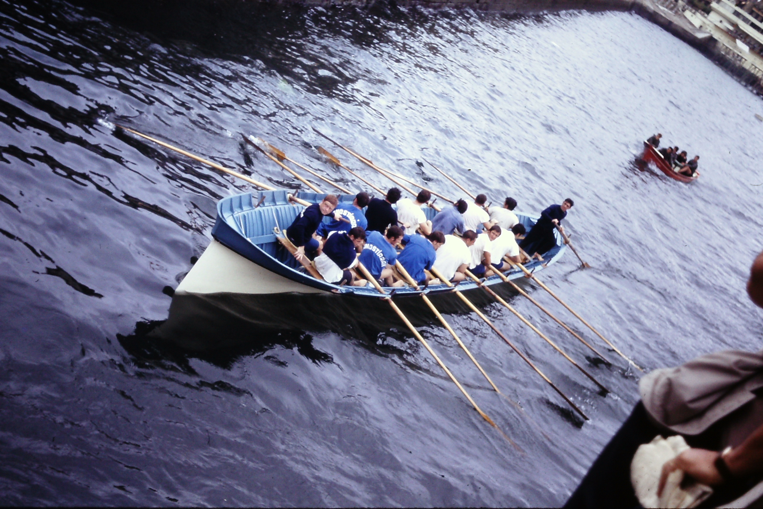 Donostiako trainerua, 1970eko hamarkadan, Kontxako Bandera jokatu berritan kaiko arrapalara iristen